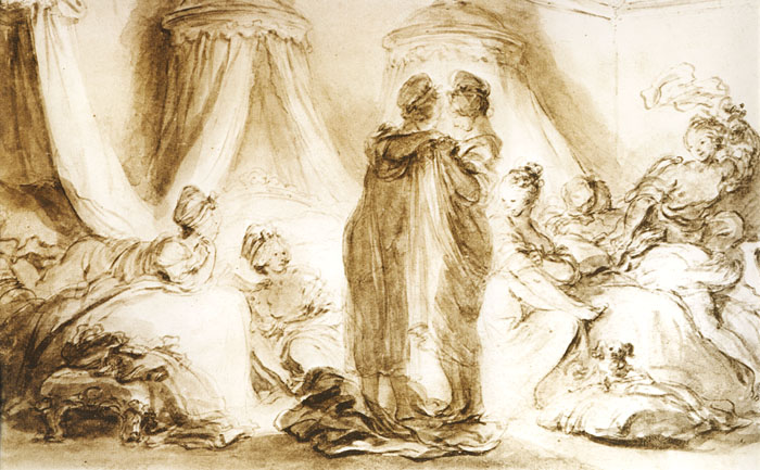 Jean-Honoré Fragonard, Le Coucher des ouvrières, lavis au bistre